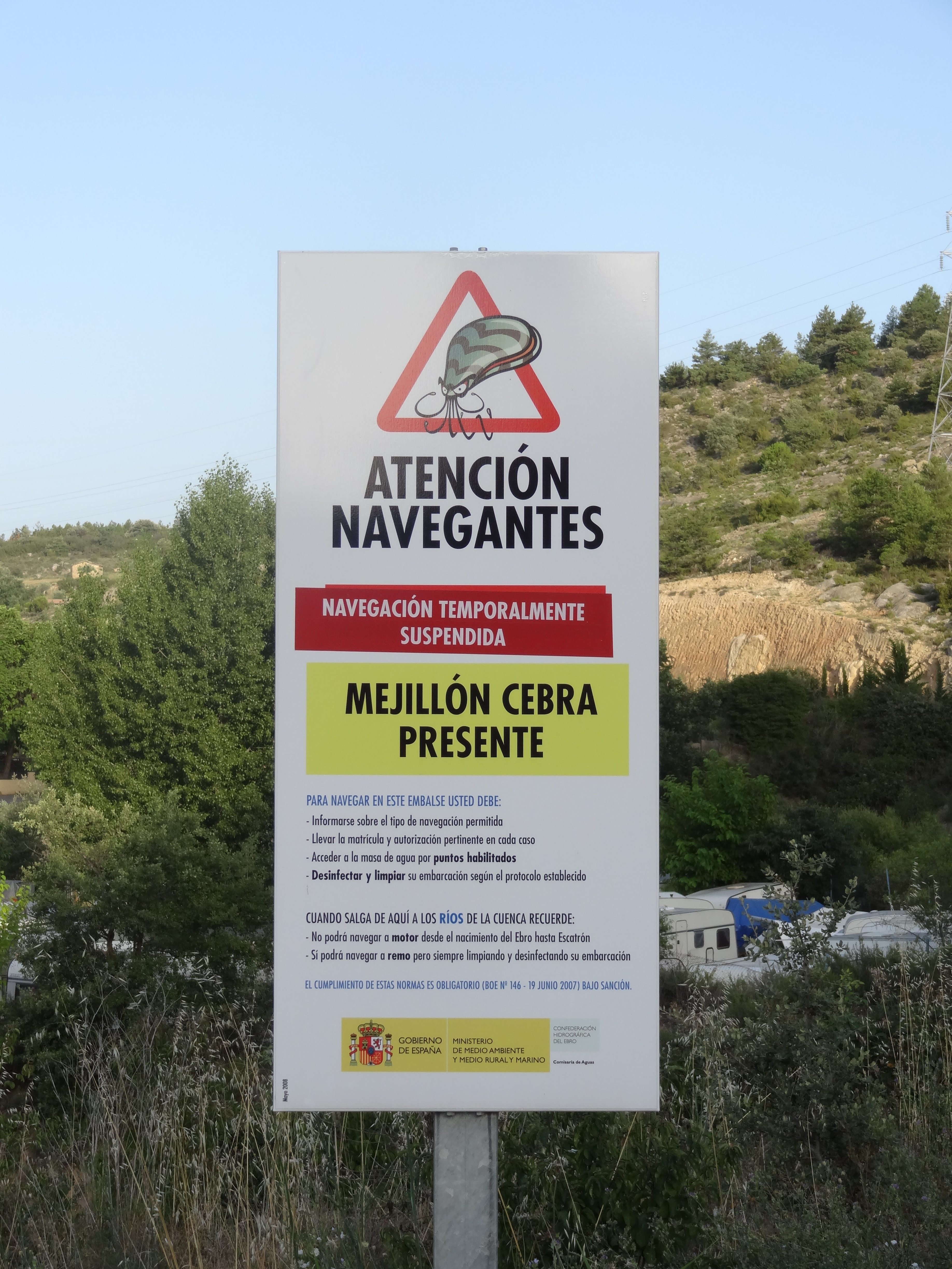 Atención navegantes, mejillón cebra, Camping Gaset (Talarn)